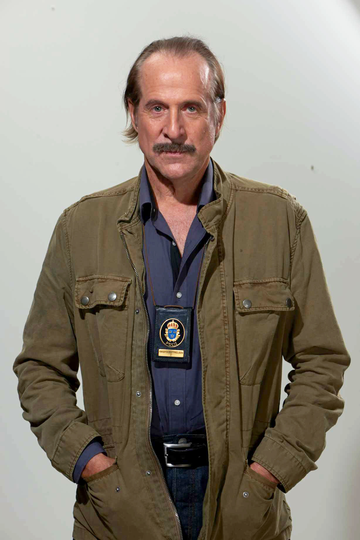 Peter Stormare som "Folke Lundgren" i tv-serien Black Widows på TV3.